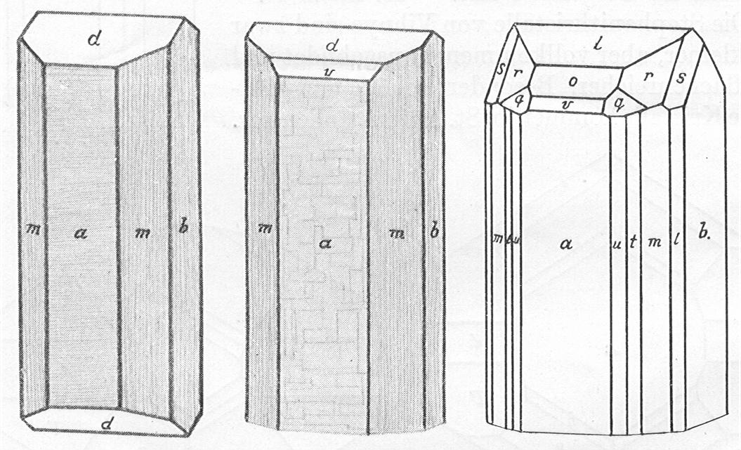 Andorit